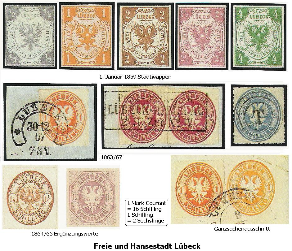 Lübecker Briefmarken gescannt W.Steven 15:03, 9. Jan. 2007 (CET) 2007